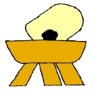 Glifo Náhuatl del municipio de Molango de Escamilla, Hidalgo